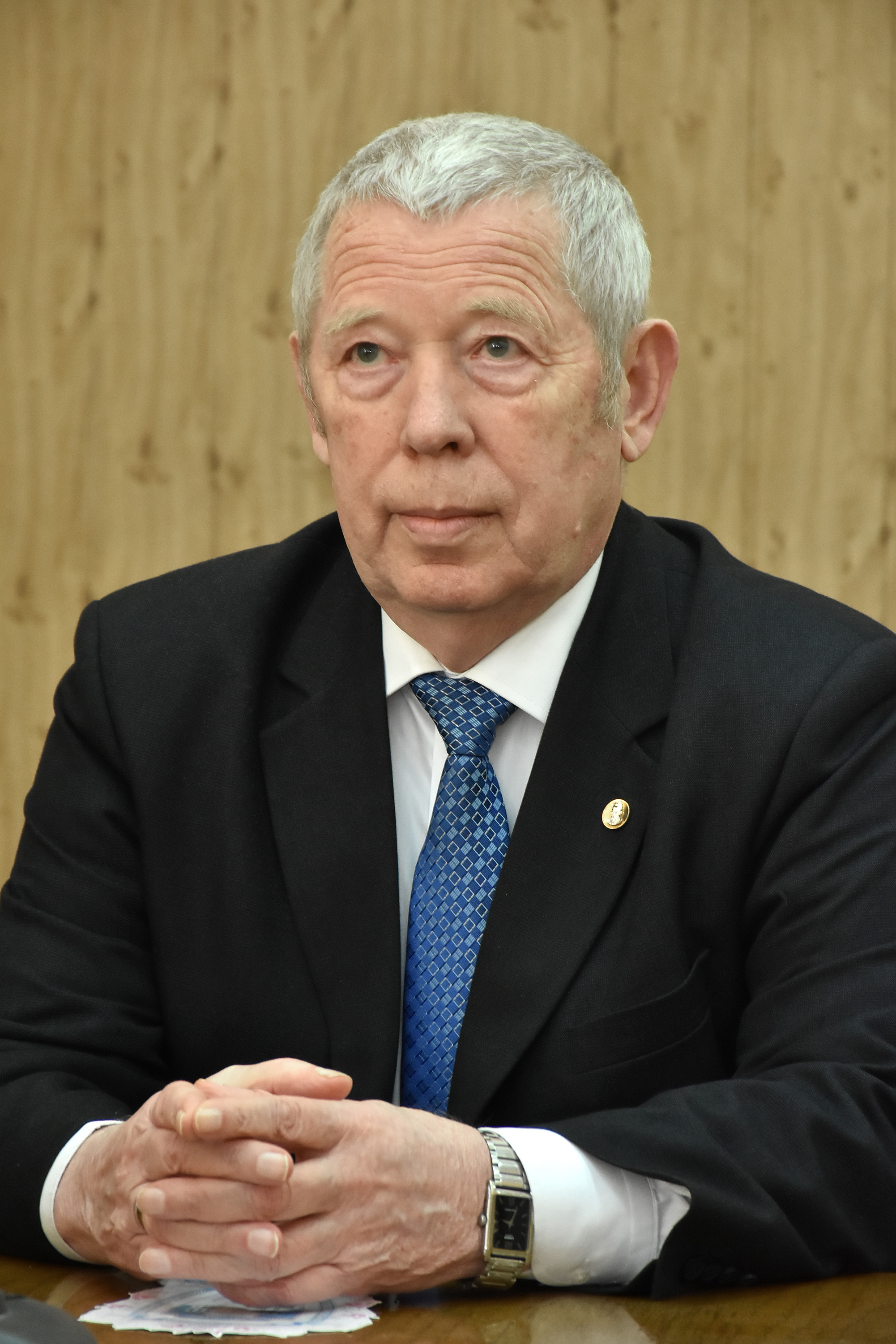 Український учений-хірург, доктор медичних наук, заслужений діяч науки і техніки України Петро Фомін.